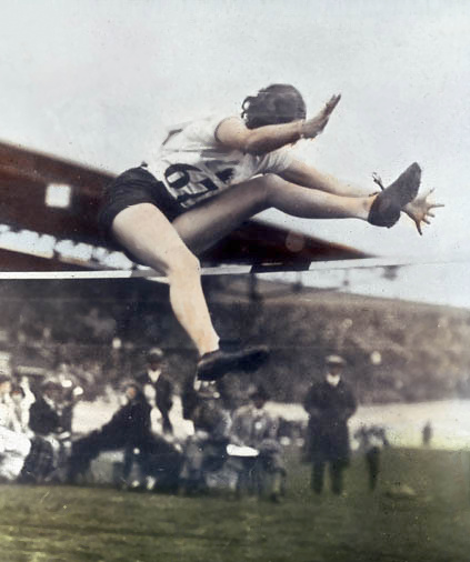 La canadienne Ethel Catherwood en 1928 aux Jeux Olympiques d'été de d'Armsterdam.